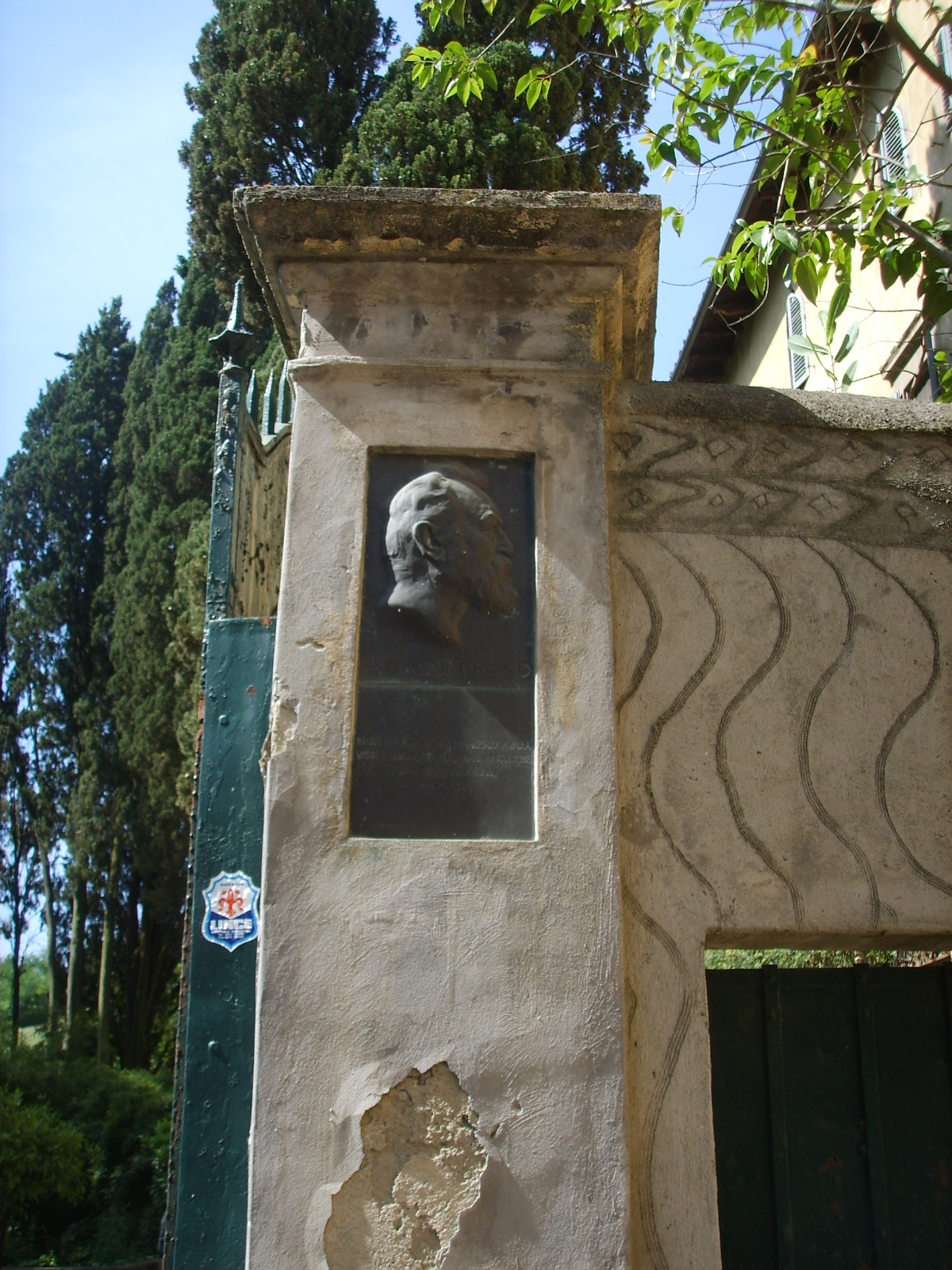 Palazzo di San Francesco di Paola, targa ingresso